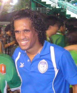 Aron da Silva